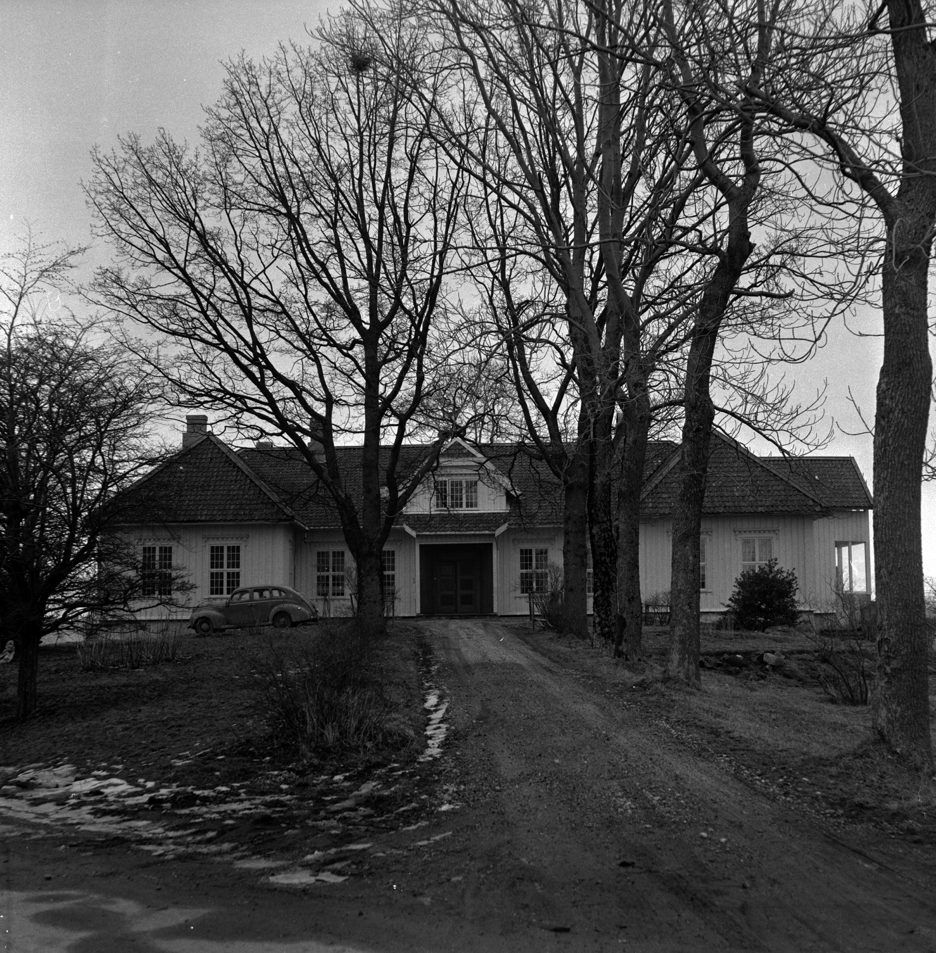 Moldegård gård i Molde.